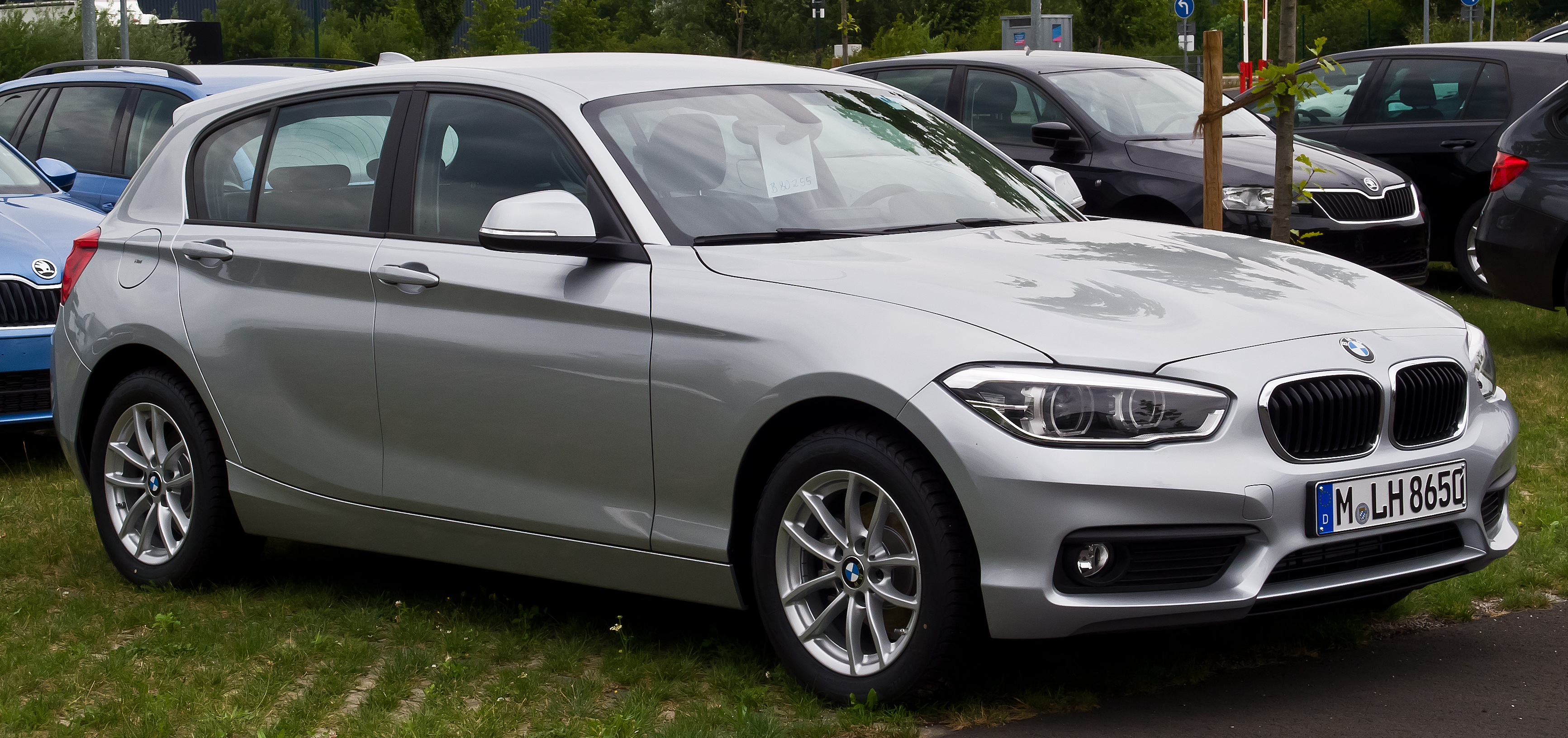 BMW 116i (F20, Facelift)